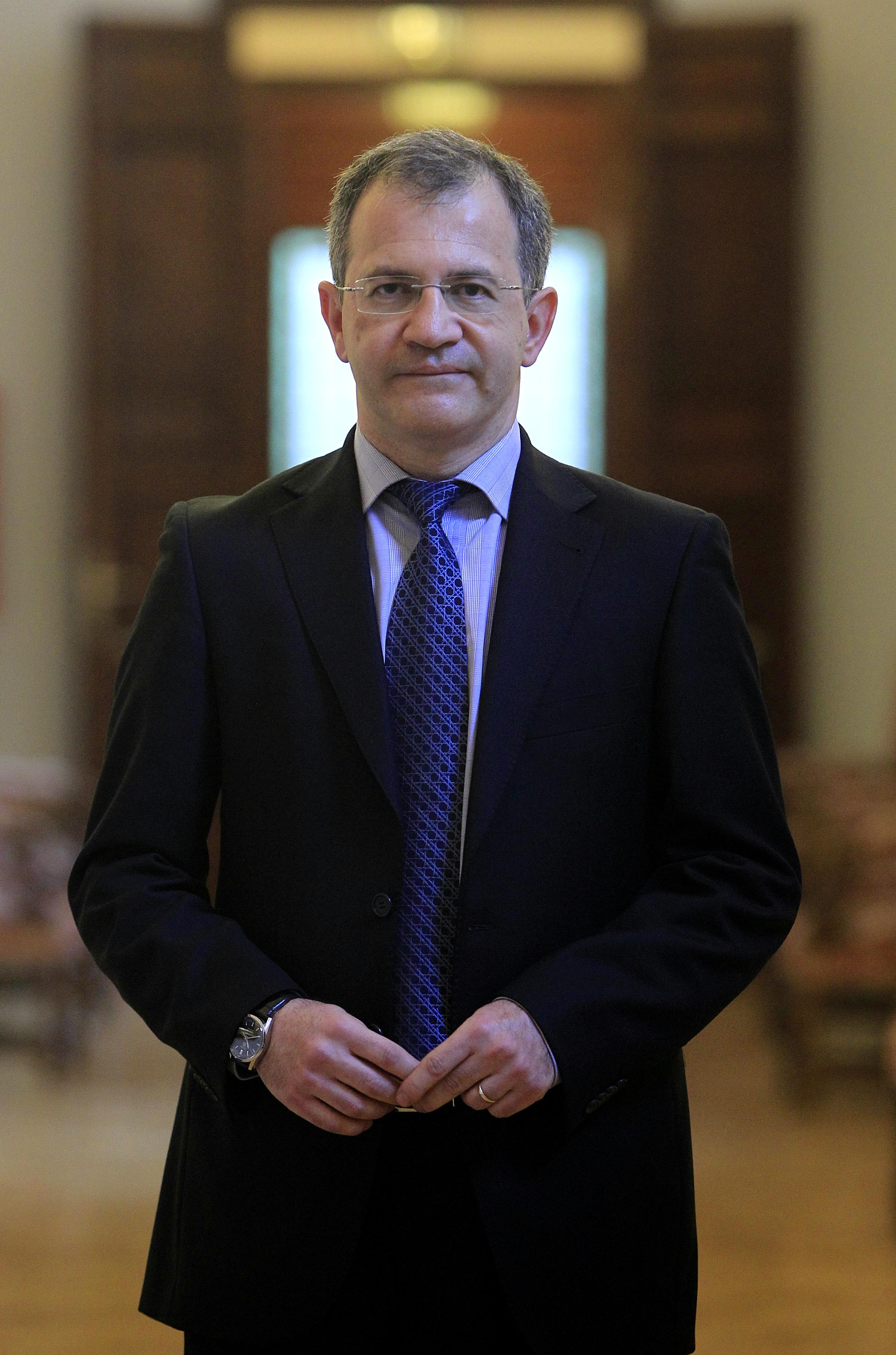 Álvaro Anchuelo, diputado y responsable económico de UPyD: "El contrato único que planteamos solo sería para las nuevas contrataciones, se convertirían todos en indefinidos con 14 días de despido". "Lo que Rajoy ha anunciado son 'chuches' electorales". "La Ley de Segunda Oportunidad es corta, la nuestra es más amplia y la propusimos hace tres años. ¡Cuánta gente se ha quedado en el camino!". "Cualquier tema de reforma autonómica es un asunto sacrosanto, no se puede pactar con otros partidos. Si uno lo plantea es un franquista, y en UPyD ninguno lo somos"